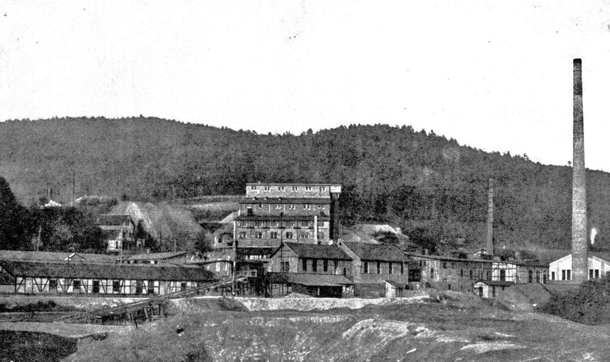 Gesamtansicht der Grube Bliesenbach mit Aufbereitung